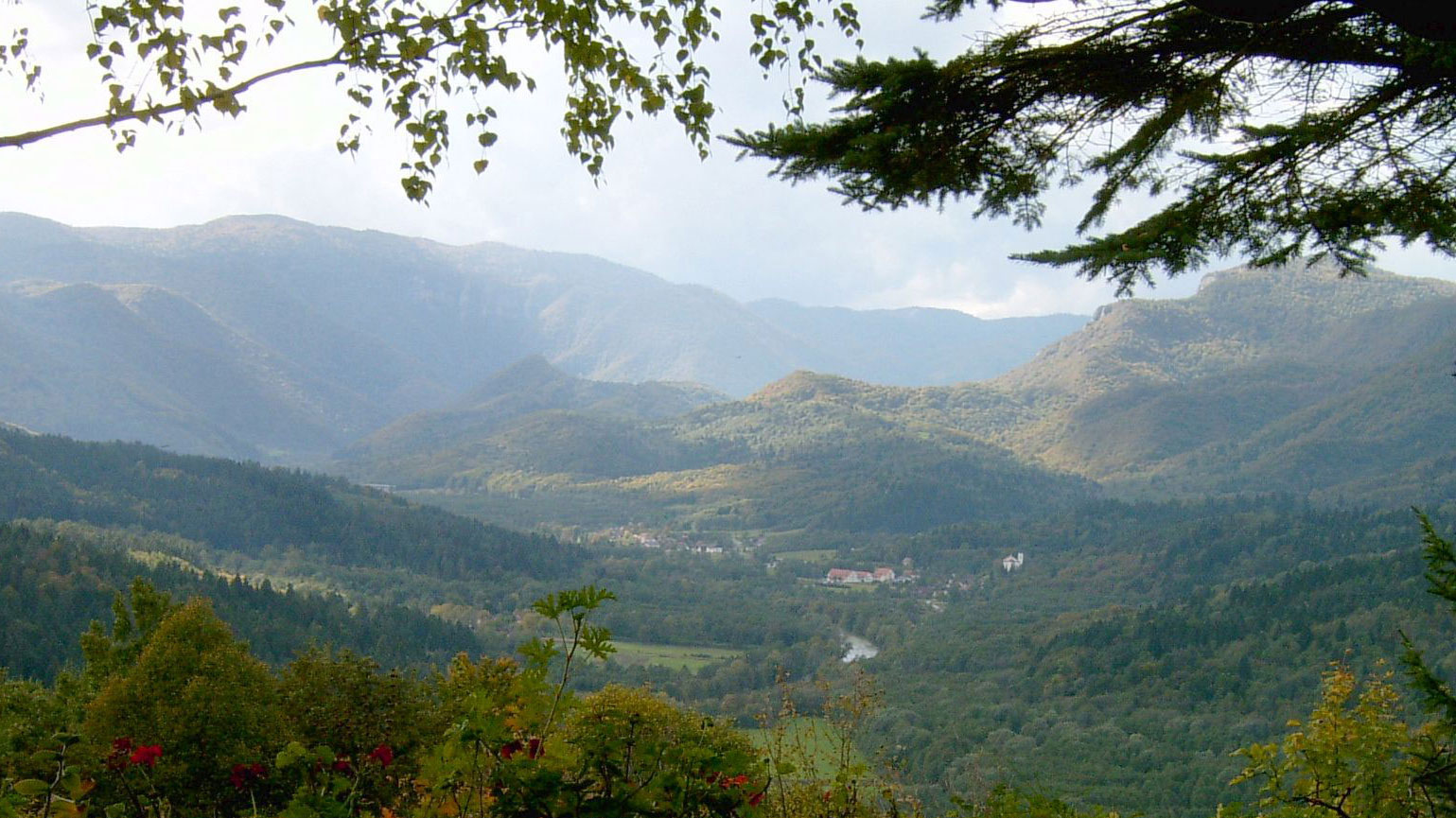 Pogled na kupsku dolinu sa istoka